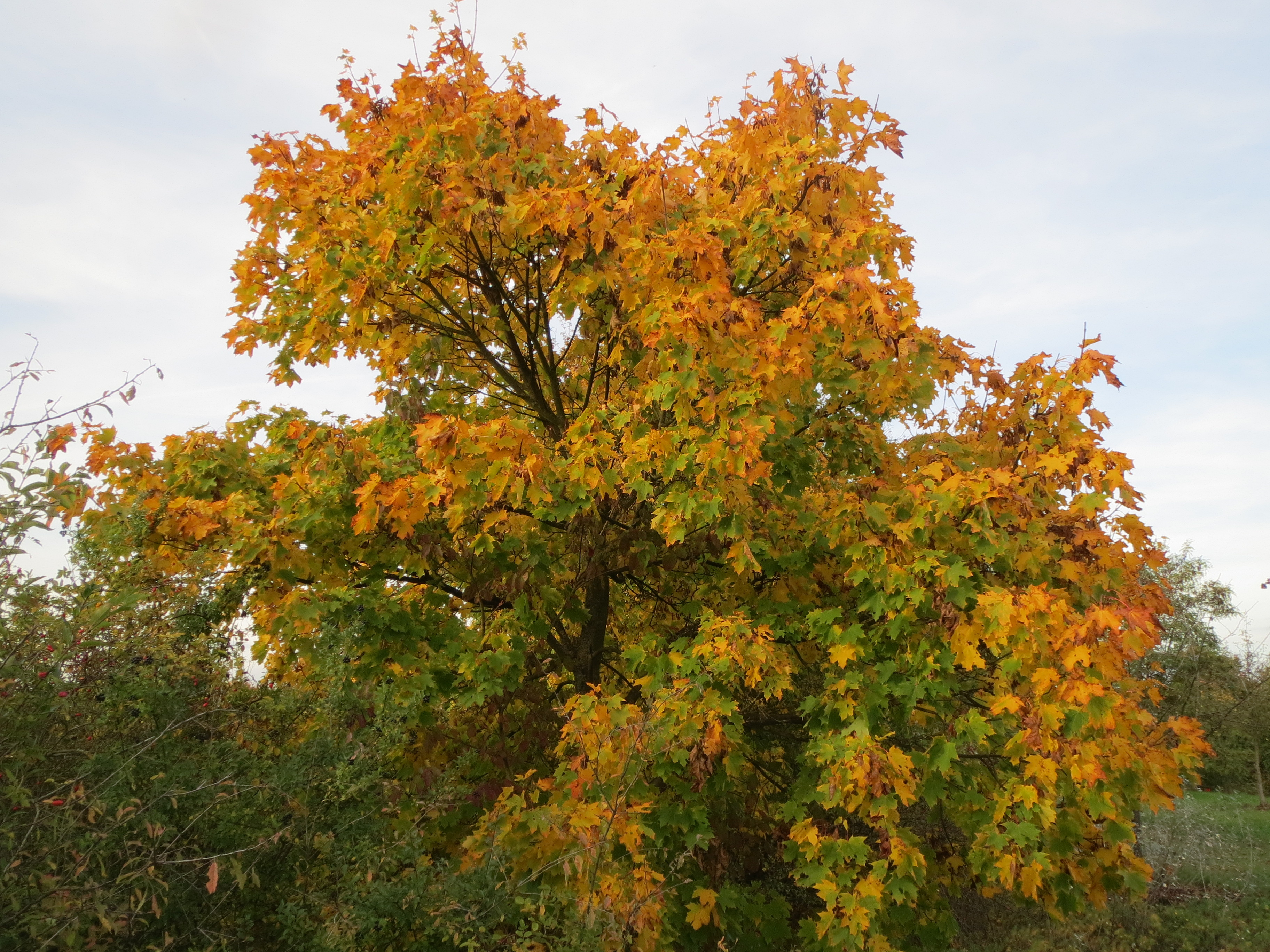 Feldahorn (Acer campestre) bei Hockenheim